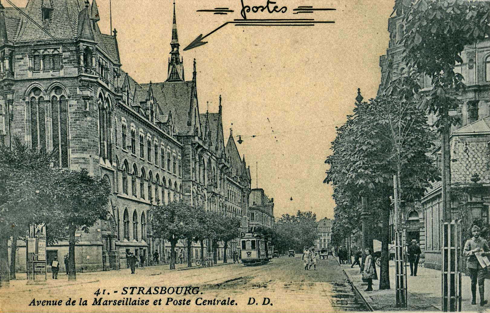 Carte postale ancienne éditée par DD, n°41 :Strasbourg - Avenue de la Marseillaise et Poste Centrale. Ligne 3 du tramway de Strasbourg, Gare - Robertsau ; motrice type C n° 107, construite par Herbrandt à Cologne en 1900, équipement électrique AEG.